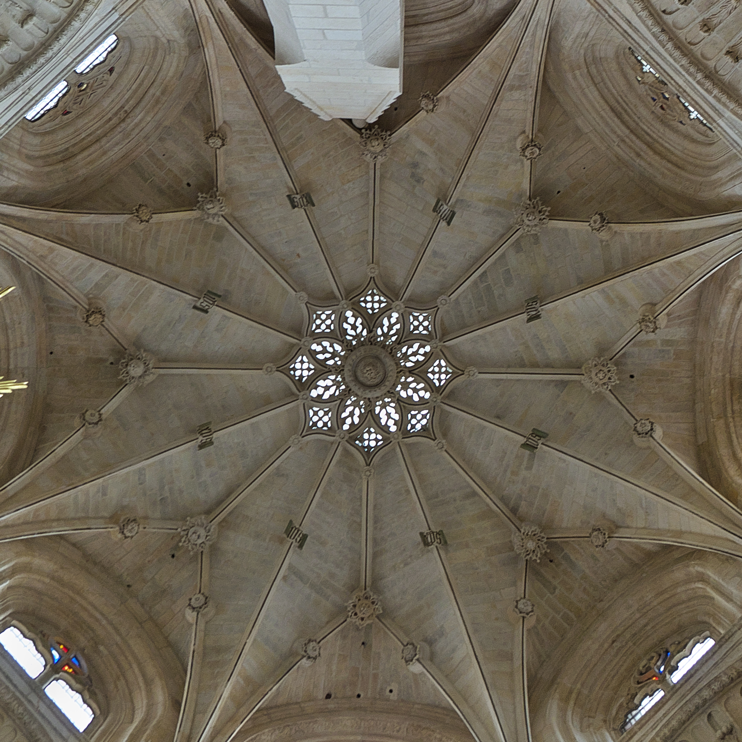 Bóveda estrellada calada de Juan de Matienzo (1521-1524)